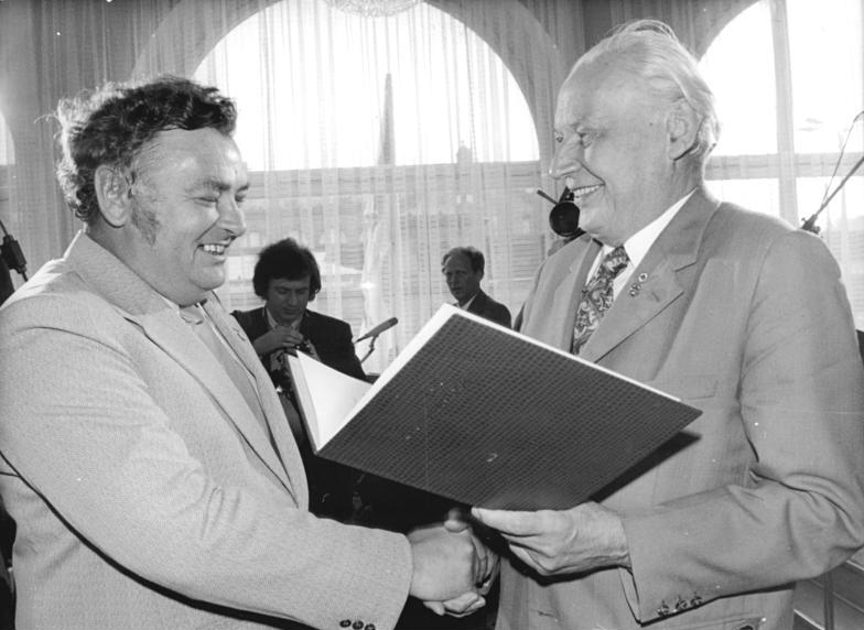 Erfurt, Preisverleihung, Herbert Warnke, Erik Neutsch ADN-ZB Katscherowski 9.6.74 Erfurt: 15. Arbeiterfestspiele - Den Kunstpreis des FDGB erhielt u.a. der Schriftsteller Erik Neutsch (l.) für seinen Roman "Auf der Suche nach Gatt". Herbert Warnke, Mitglied des Politbüros des ZK der SED und Vorsitzender des Bundesvorstandes des FDGB, verlieh den Kunstpreis in einer Feierstunde im Interhotel "Erfurter Hof" am 9.6.74.